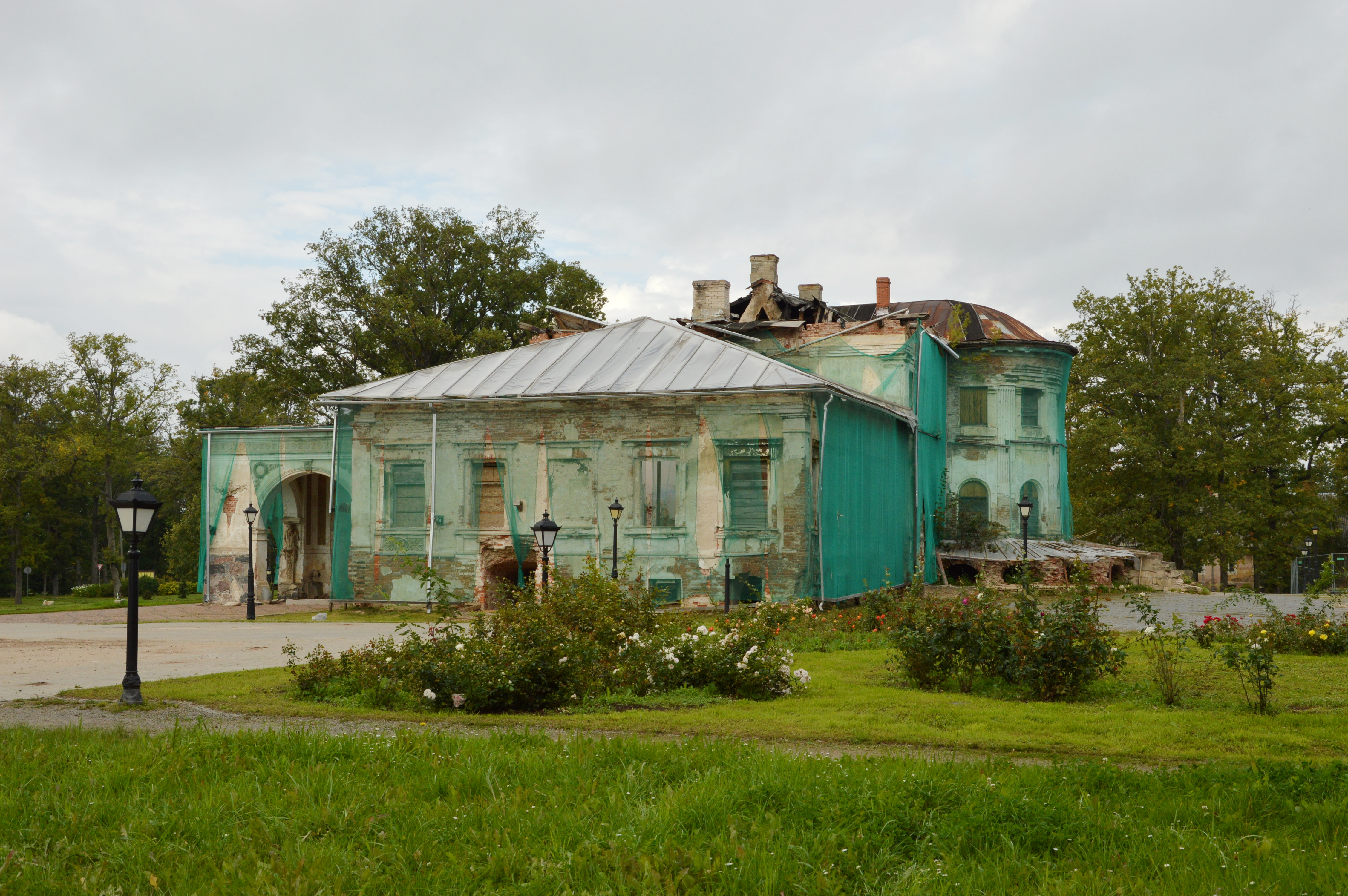 Vana-Gulbene mõis, avariilises seisukorras olev Balta pils ehk Valge loss.